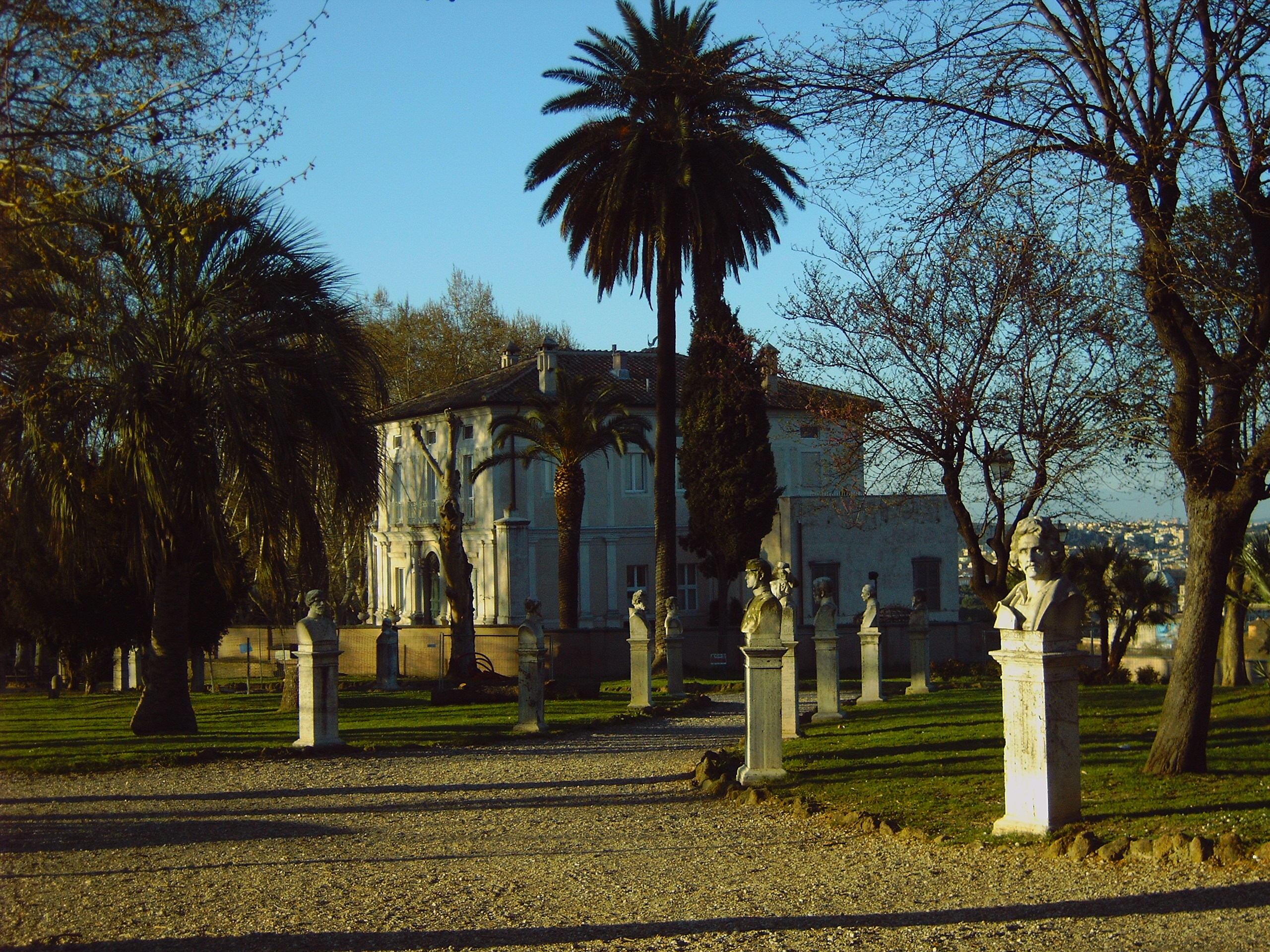 Villa Lante on Gianicolo hill, Rome, Italy. Photo taken by Käyttäjä:Ianuaria on April 2006.